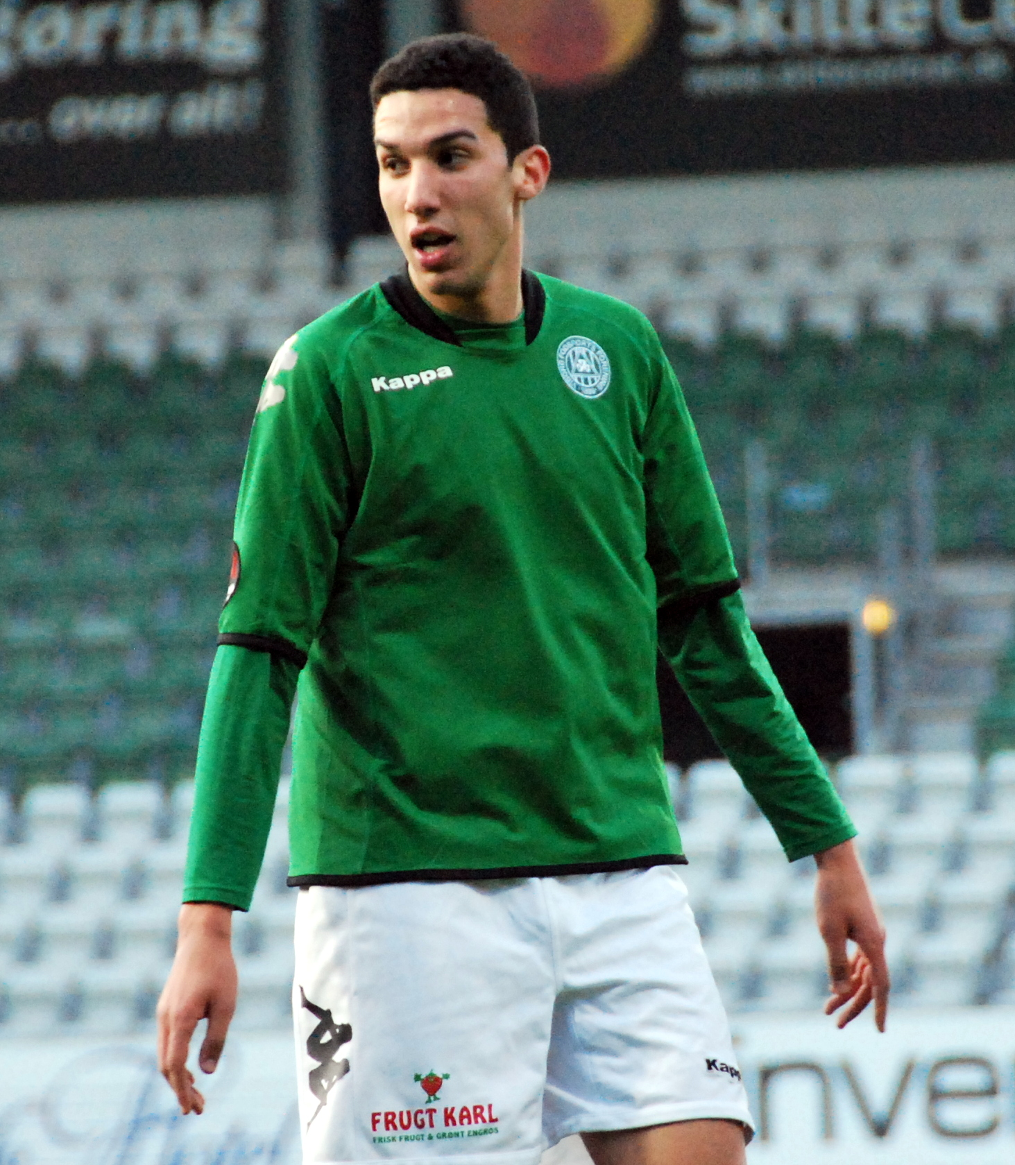 Fodboldspilleren Adda Djeziri fra Viborg FF. Her under en 1. divisionskamp mod Randers FC på Viborg Stadion.